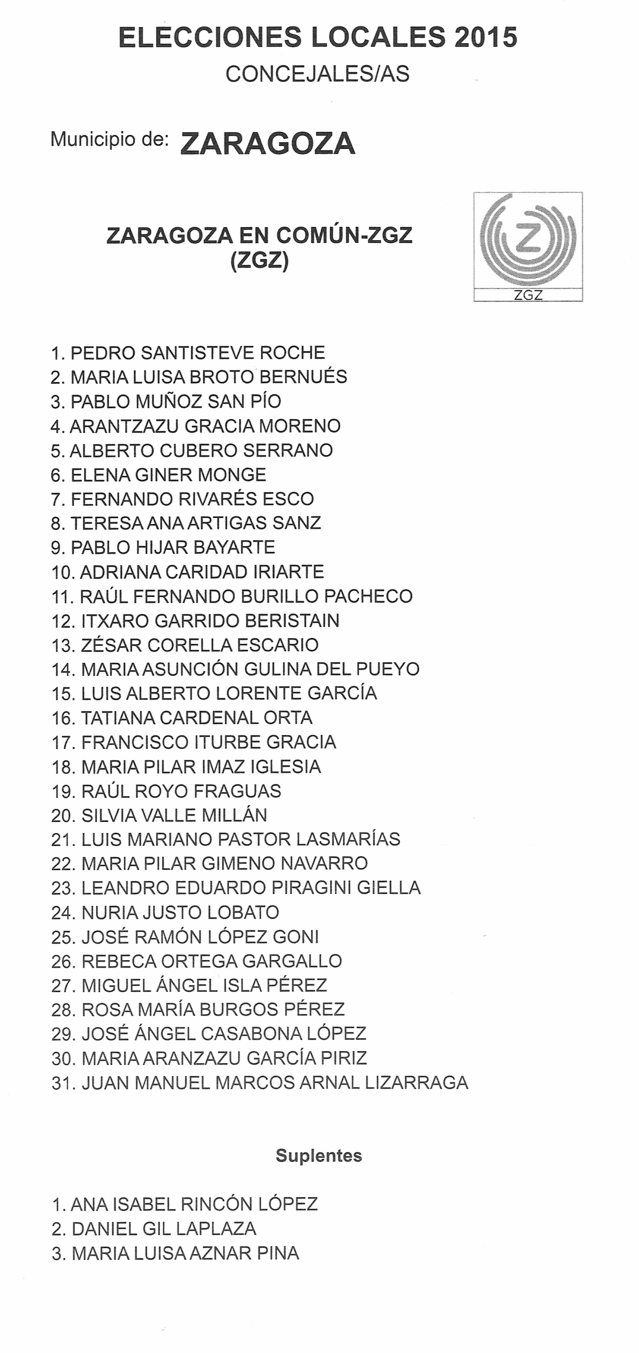 Papeleta del partido Zaragoza en común (ZGZ) para las elecciones municipales del 24 de mayo de 2015 al Ayuntamiento de Zaragoza.